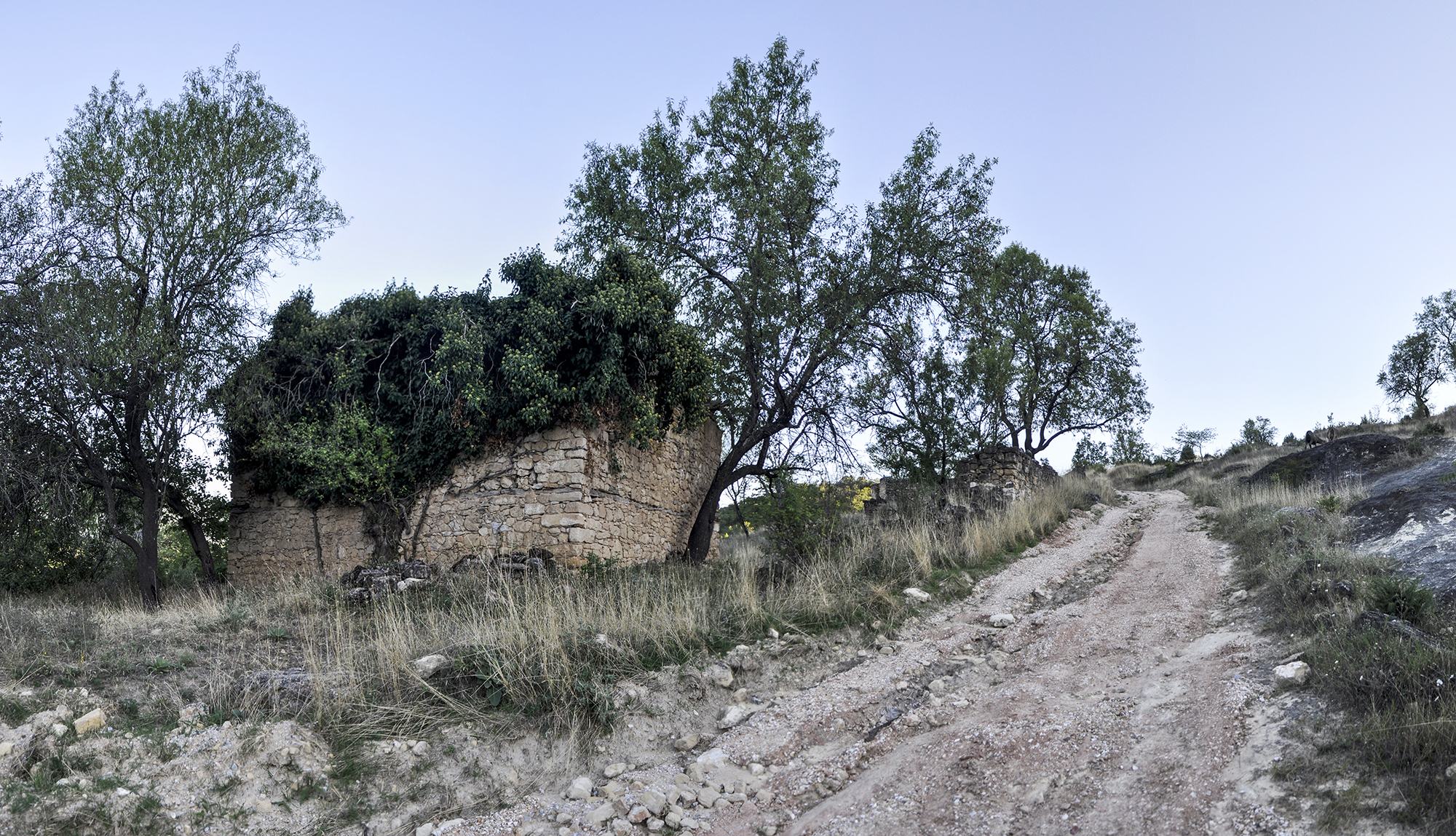 Интересна камена архитектура на куќите во Говрлево, повеќето се напуштени и обраснати со зеленило.